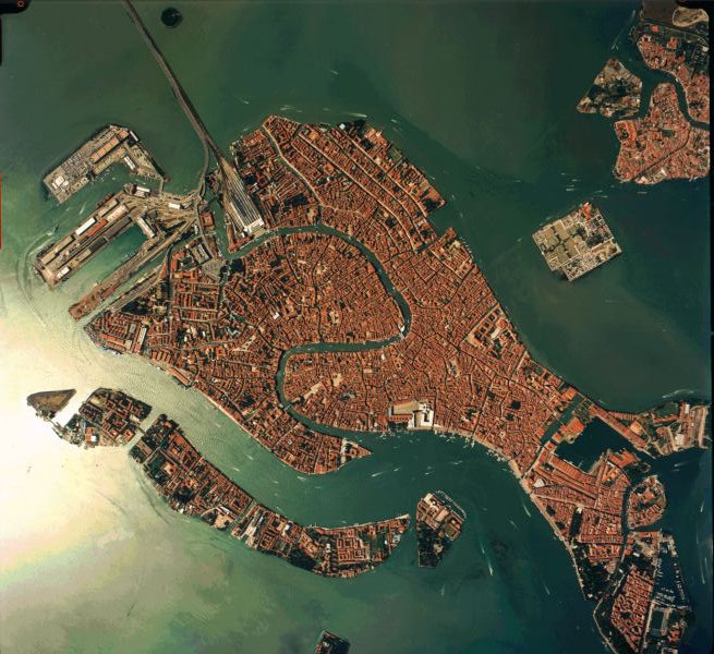 Satellitenbild Venedig, hier besser nach Norden ausgerichtet